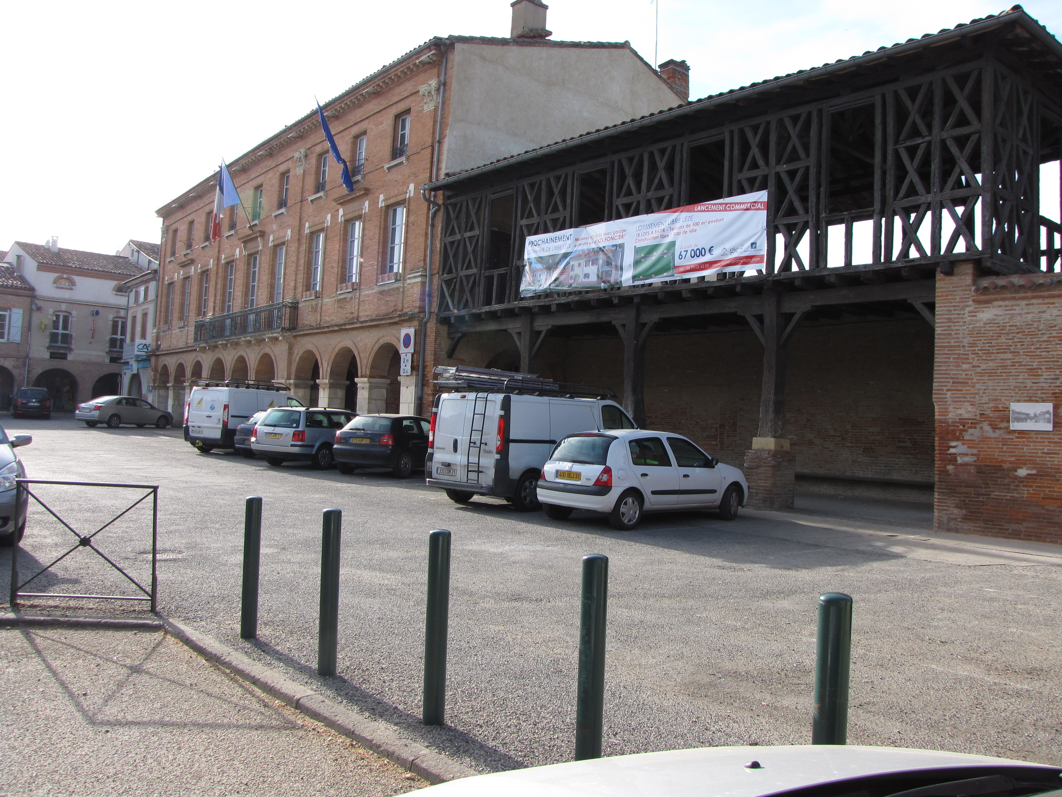 Mairie de Saint-Sulpice-sur-Lèze